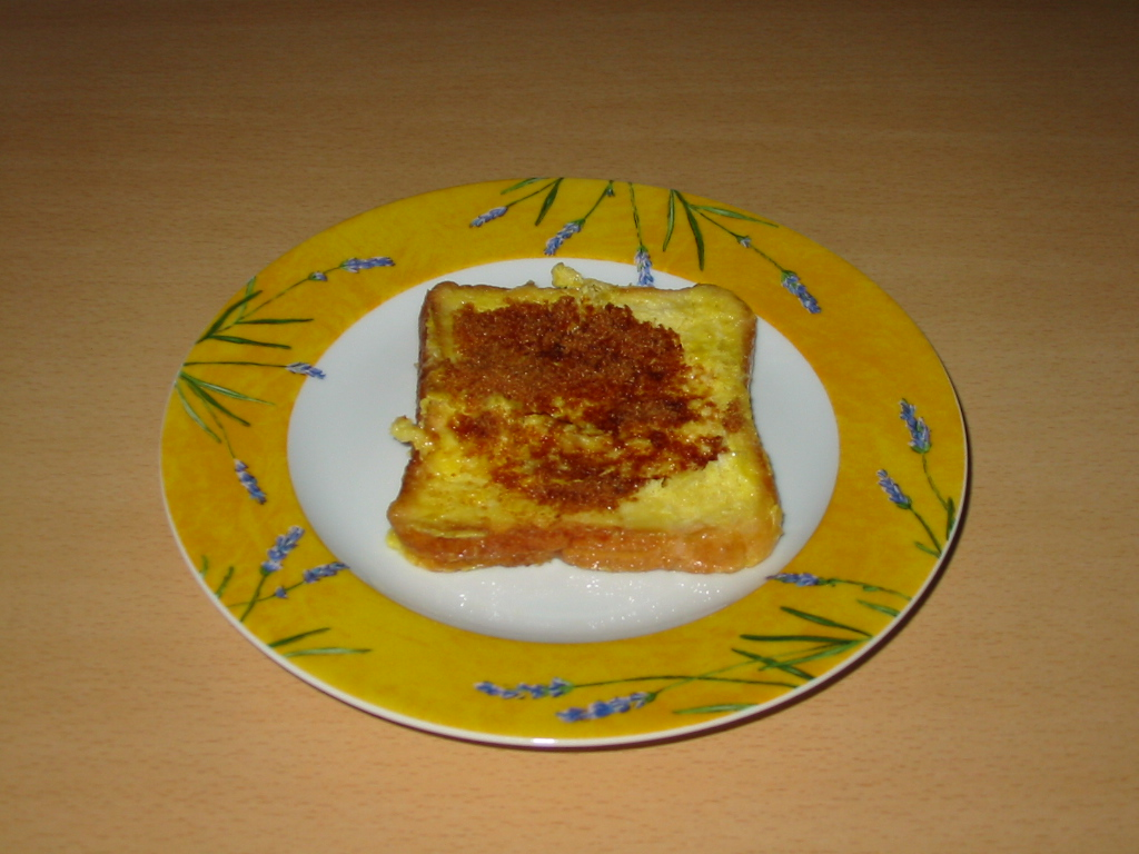 pain perdu